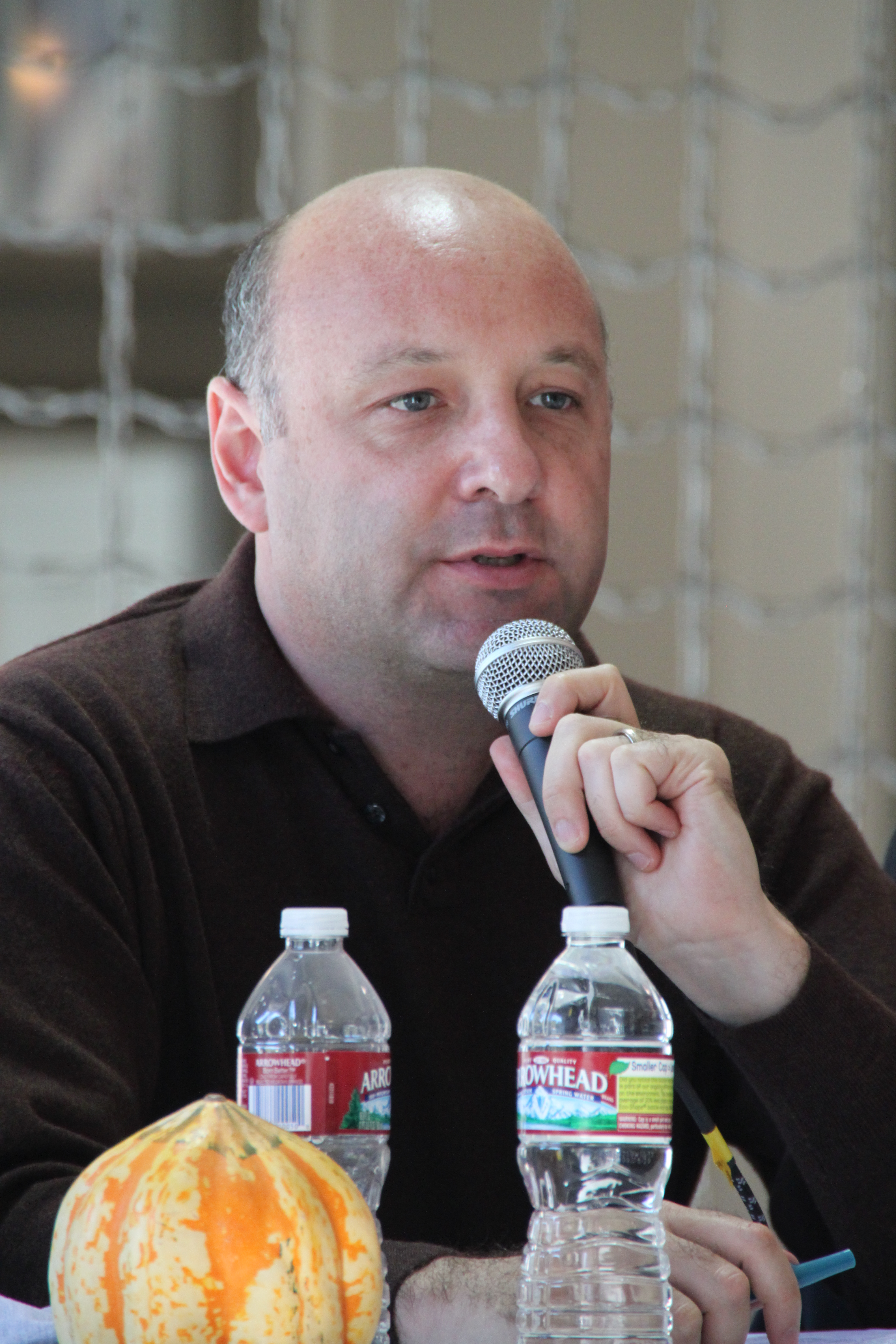 Gil Penchina